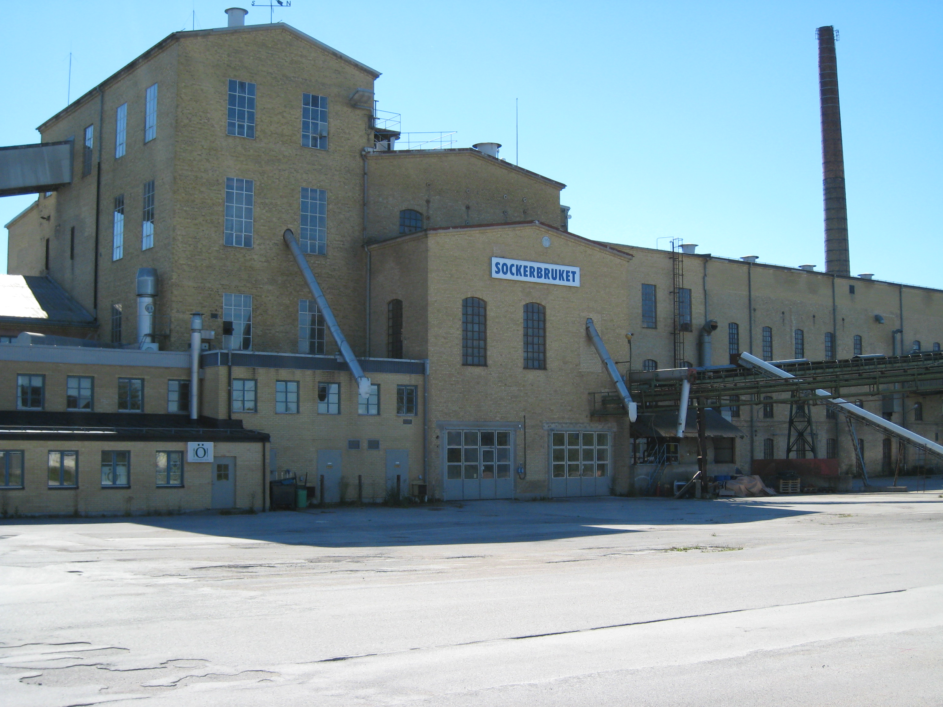 Sugar refinary